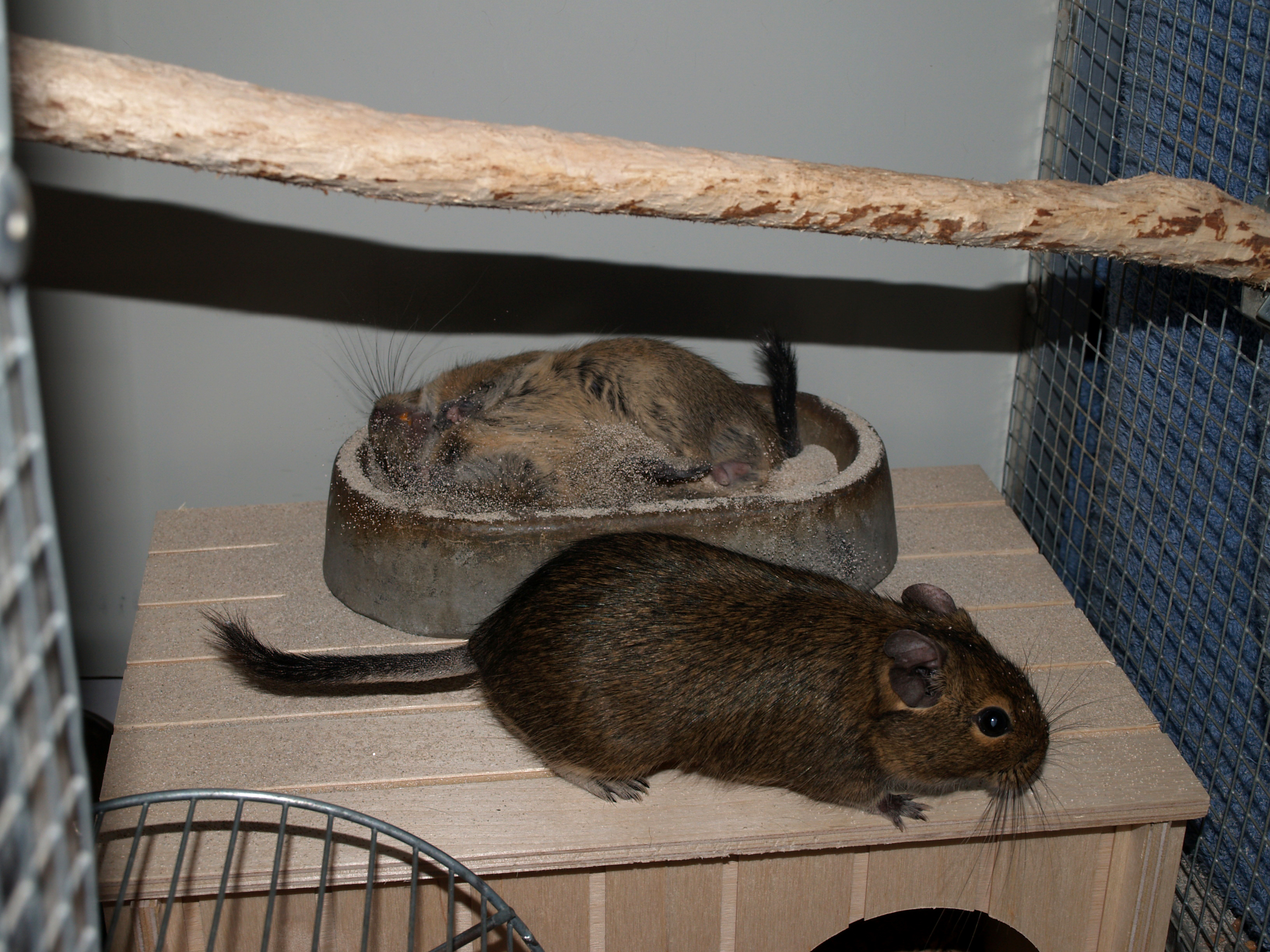 Een degoe genietend van zijn zandbadje.